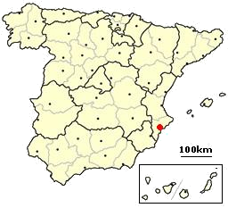 Localización de la ciudad de Alicante en España